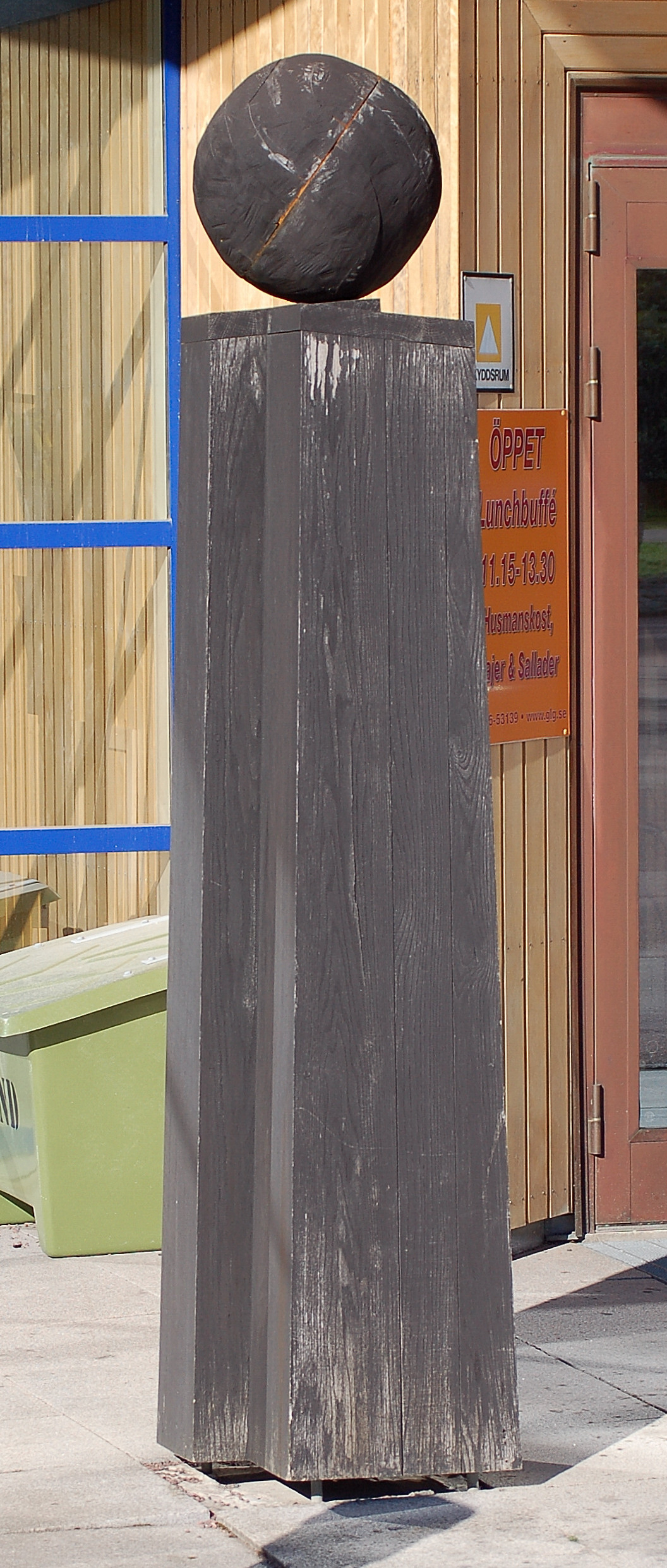 Balanserande klot av Bo Jonzon 1999 utförd i Bo Jonzon placerad vid entrén till Stora Enso Research, Kronoparken, Karlstad.